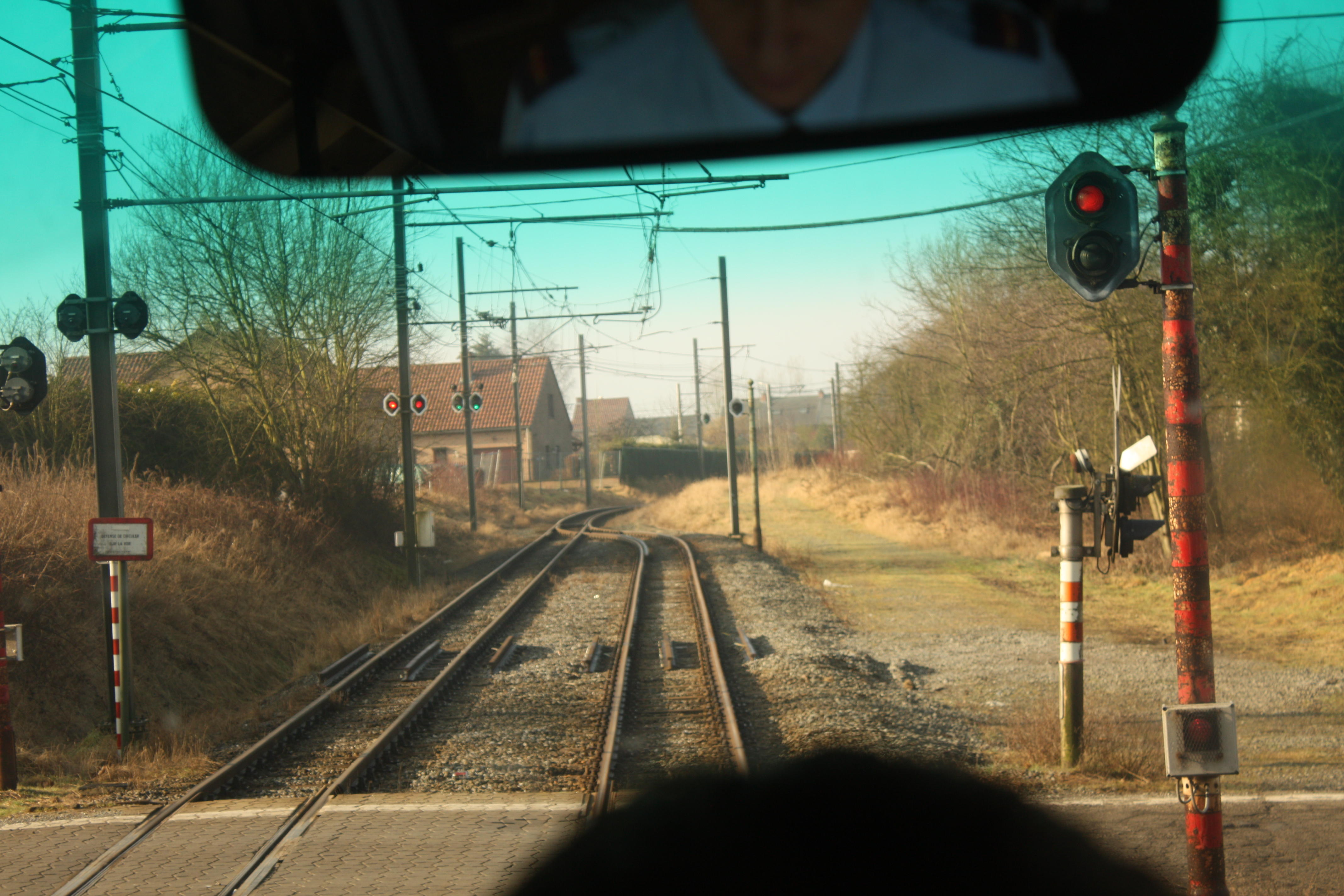 Enkelspoorbeveiliging ter hoogte van Anderlues Nº 2. De lichtseinen aan de uiterste linkerrand van de foto en aan de rood-witte paal rechts hebben te maken met de bewaakte overweg op de voorgrond. In dit geval is er een voorliggende tram in de zelfde richting op het enkelsporige deel aan het rijden. Aan de meest linker bovenleidingmast de achterkant van een controlesein. Aan de tweede mast een rood voorsein dat het verbiedt om het enkelsporige deel op te rijden. Aan de derde mast een groen hoofdsein dat de voorliggende tram toestemming geeft het enkelspoor te berijden. Aan de derde mast langs het enkelsporige deel is een herhalingssein te zien, dat groen toont. Het enkele lichtsein aan de paal langs het rechtersein heeft ook met de overweginstallatie te maken.